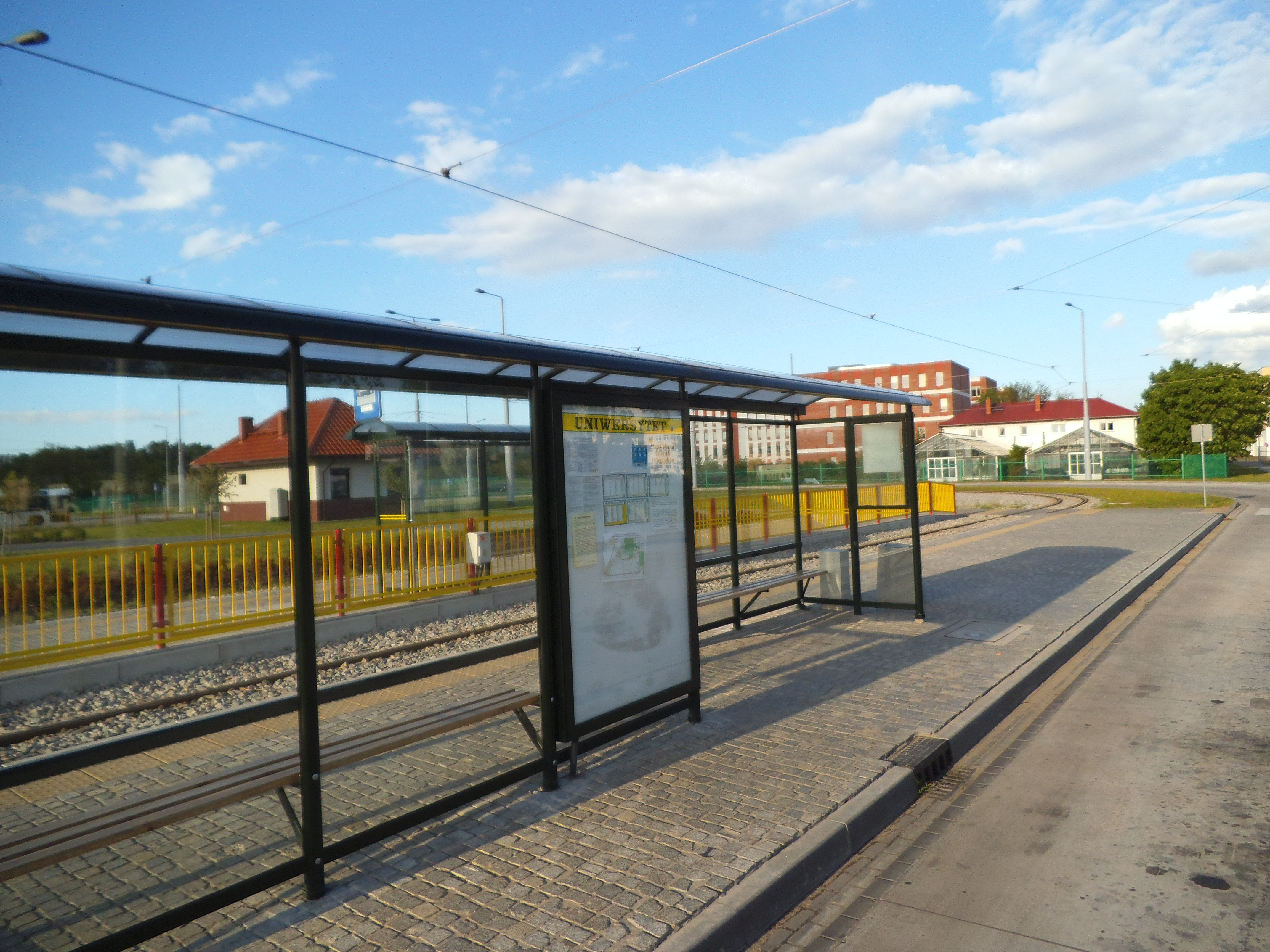 Pętla Uniwersytet w Toruniu